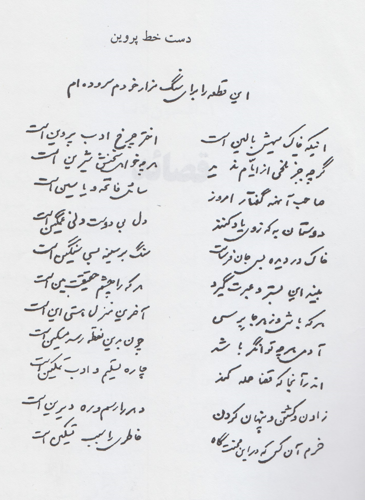 اینکه خاک سیه‌اش بالین استاختر چرخ ادب پروین استگر چه جز تلخی از ایام ندیدهر چه خواهی سخنش شیرین استصاحب آن‌همه گفتار امروزسائل فاتحه و یاسین استدوستان به که ز وی یاد کننددل بی دوست دلی غمگین استخاک در دیده بسی جان فرساستسنگ بر سینه بسی سنگین استبیند این بستر و عبرت گیردهر که را چشم حقیقت بین استهر که باشی و ز هر جا برسیآخرین منزل هستی این استآدمی هر چه توانگر باشدچون بدین نقطه رسد مسکین استاندر آنجا که قضا حمله کندچاره تسلیم و ادب تمکین استزادن و کشتن و پنهان کردندهر را رسم و ره دیرین استخرم آنکس که در این محنت گاهخاطری را سبب تسکین است